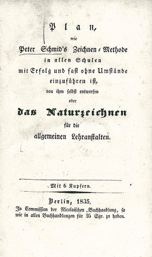 Peter Schmid, Plan, Formenlehre Titelblatt. Stadtbibliothek Trier